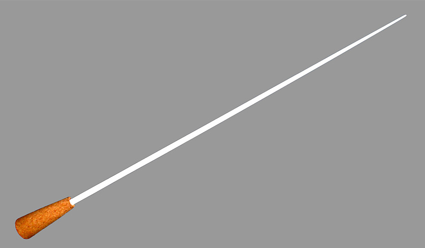 Ein moderner Taktstock aus Weißbuche mit kegelförmigen Korkgriff.